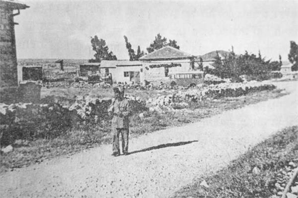 בדרך אל נקודת השמירה בנוה-יעקב